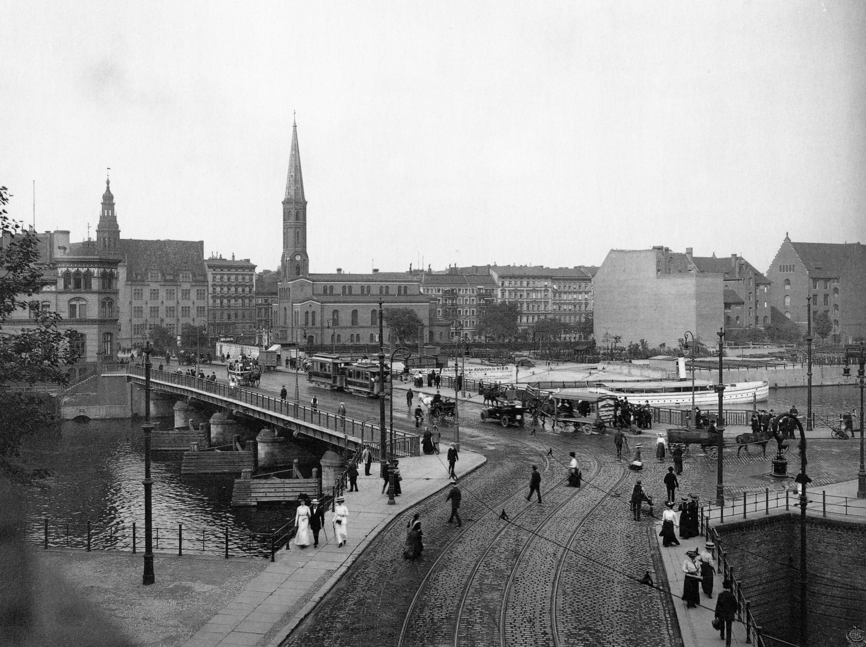 Schillingbrücke über die Spree in Berlin